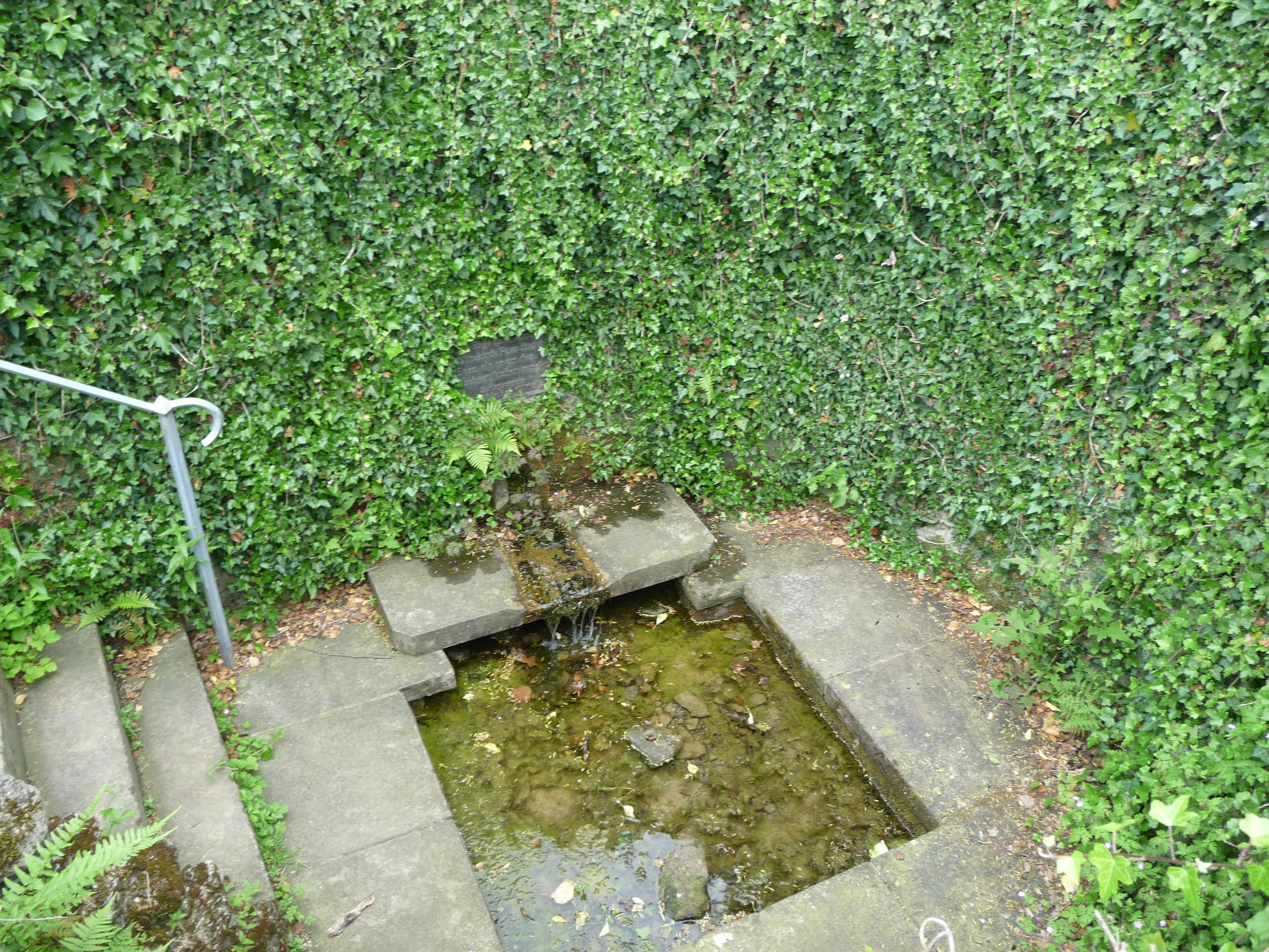 Ev.-luth. Kirche Bergkirchen, Wittekindsquelle